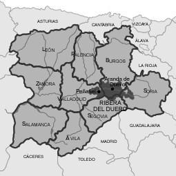 Région viticole de Ribera del Duero en Castille-León (Espagne).